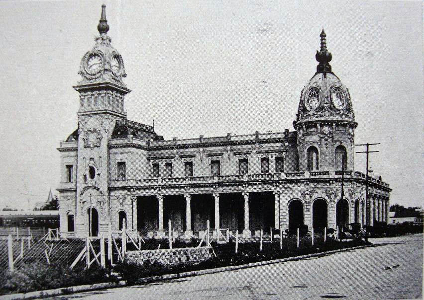 Mar del Plata Sud railway station, designed by Arq. Julio Dormal, opened in 1910. It was closed in 1949, operating since that as the bus terminus of the city until 2009.